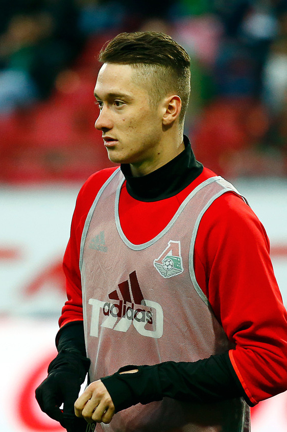 «Локомотив» - «Оренбург»